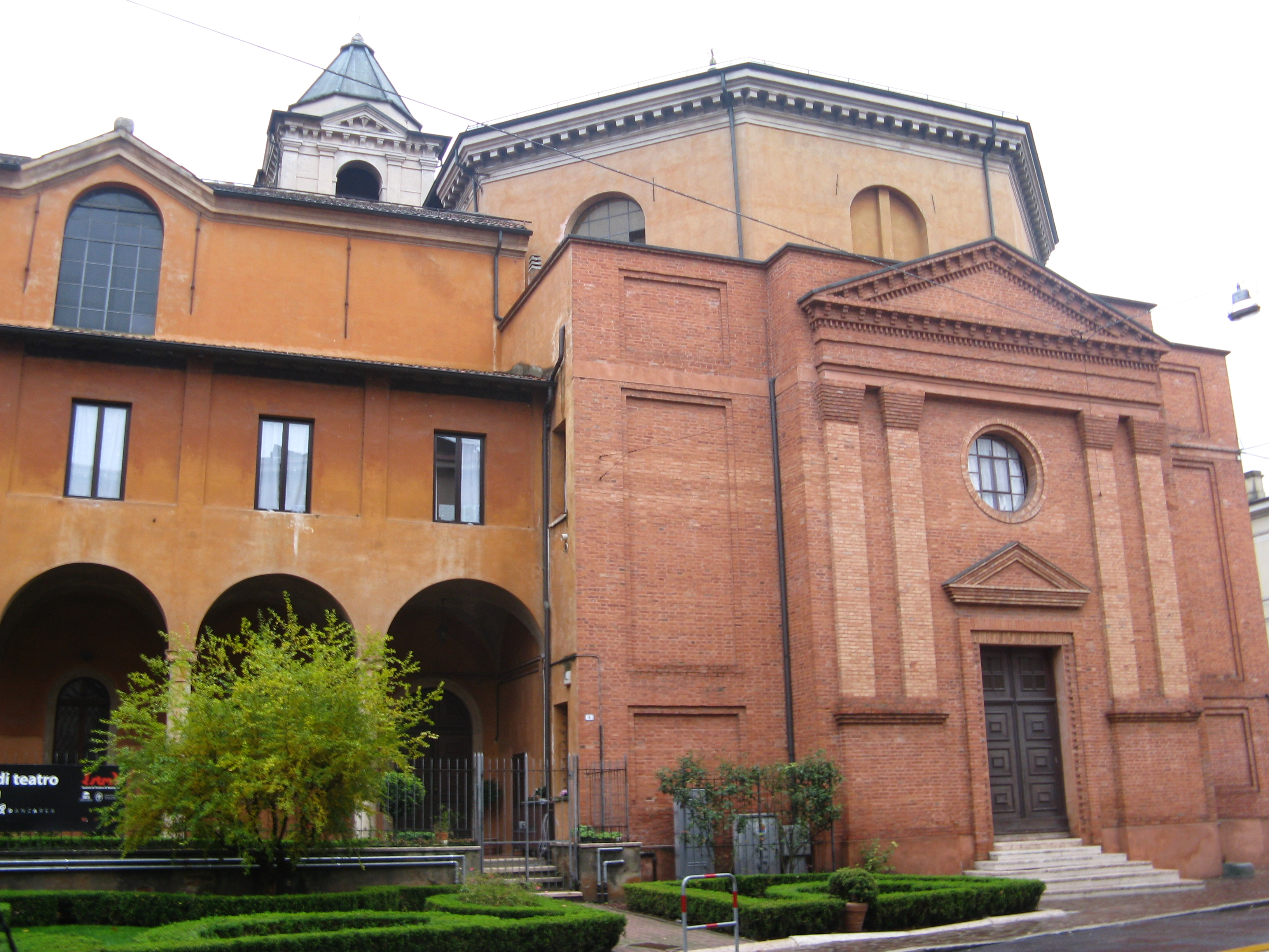 Chiesa di Sant' Orsola (Mantova)